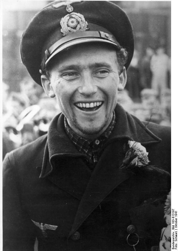 Friedrich Guggenberger Im besetzten Gebiet: (Frankreich) Oberleutnant Guggelberger [Friedrich Guggenberger], der Kommandant eines erfolgreichen Unterseebootes [U-81]. Oktober 1941 PK-Aufnahme: Kriegsberichter Schwarz (Sch.) 9957-41 "Fr" "Fr. OKW" Okt. 41 [Porträt Friedrich Guggenberger, Kommandant von U-Boot U-81] Abgebildete Personen: Guggenberger, Friedrich: Kapitänleutnant, Ritterkreuz (RK), Marine, Deutschland